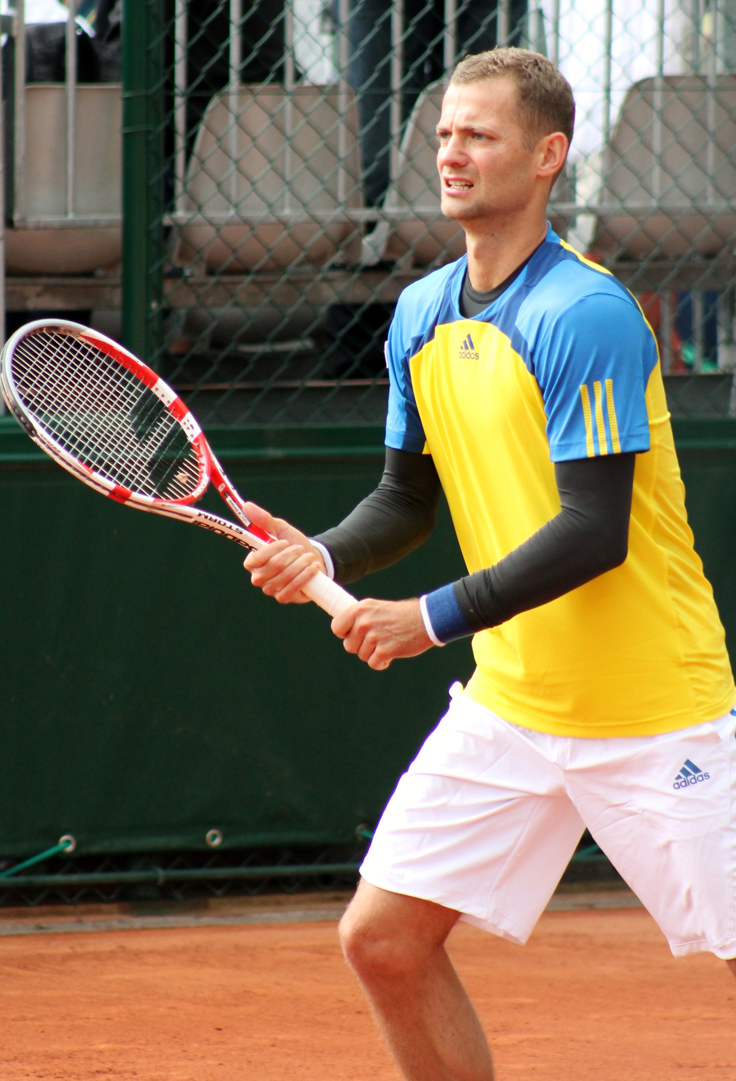 Fyrstenberg RG13 (11)